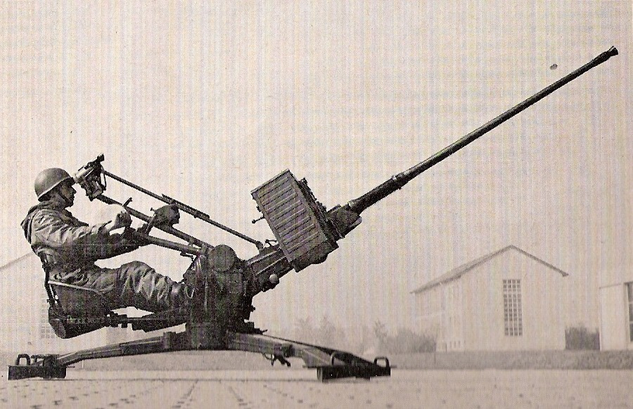 Feldkanone 20 mm der Wach- und Begleitbatterie, Hispano-Suiza 820 L/85, von Rheinmetall in Lizenz gefertigt, Bundeswehrbezeichnung MK 20-1